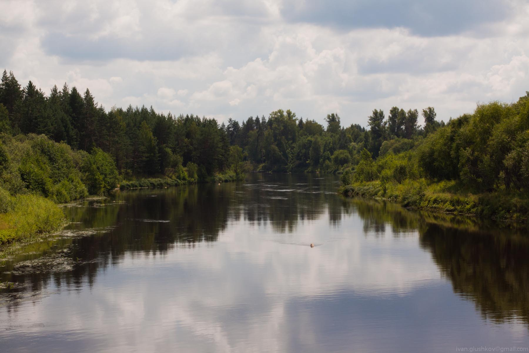 река Большой Кокшага